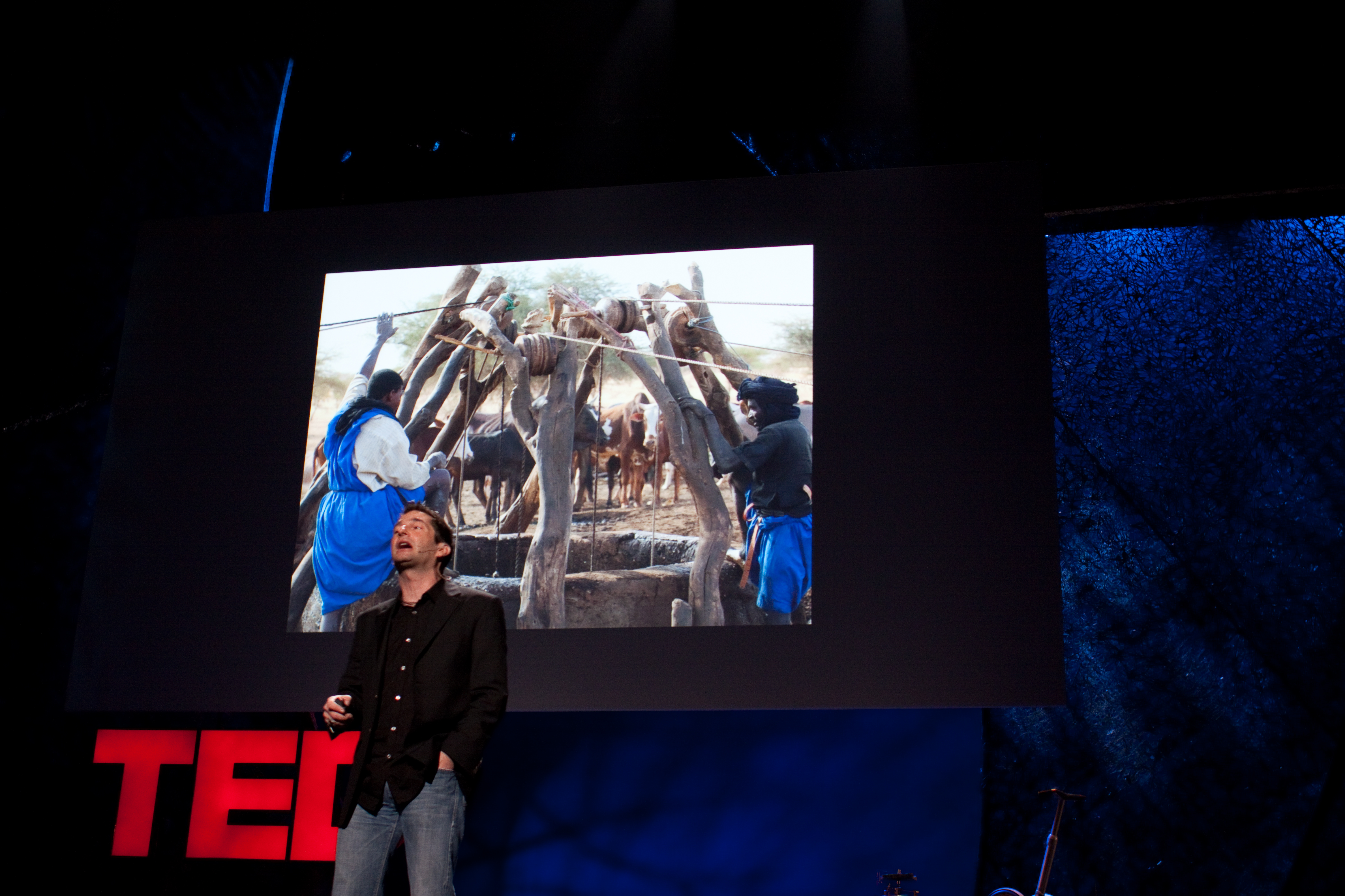 Ray Zahab speaking at TED